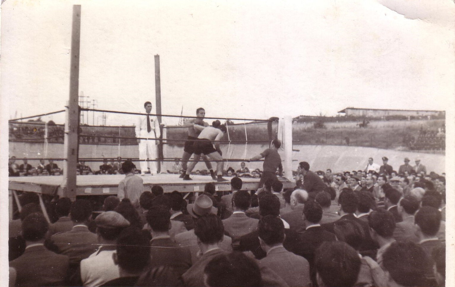 incontro jannilli velodromo appio